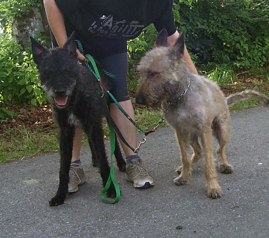 Hollandse Herder und Laken.... wer ist wohl wer?